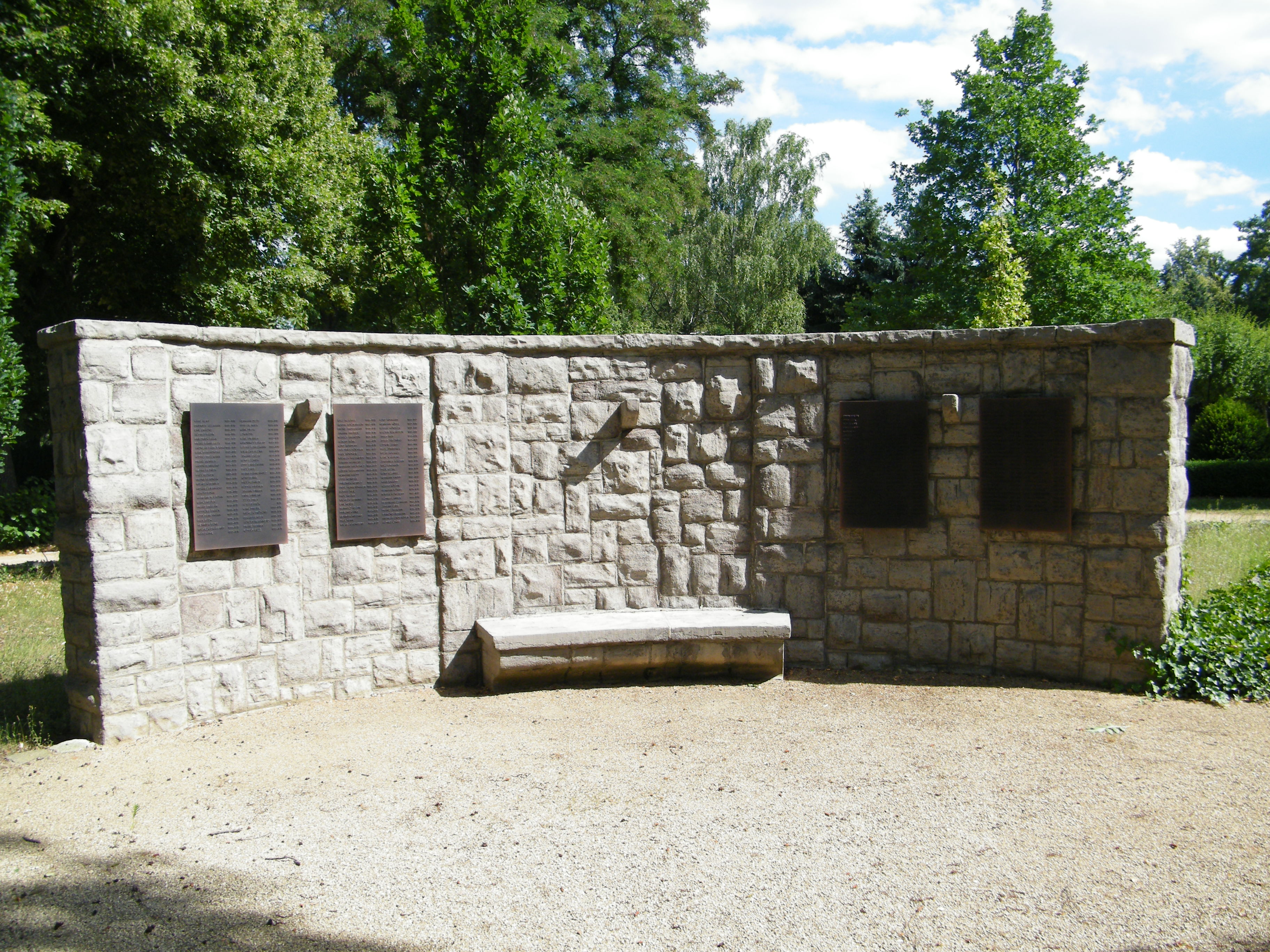 Gedenkstätte auf dem Friedhof 2 in Bernburg/Saale für die Gefallenen des 1. Weltkrieges